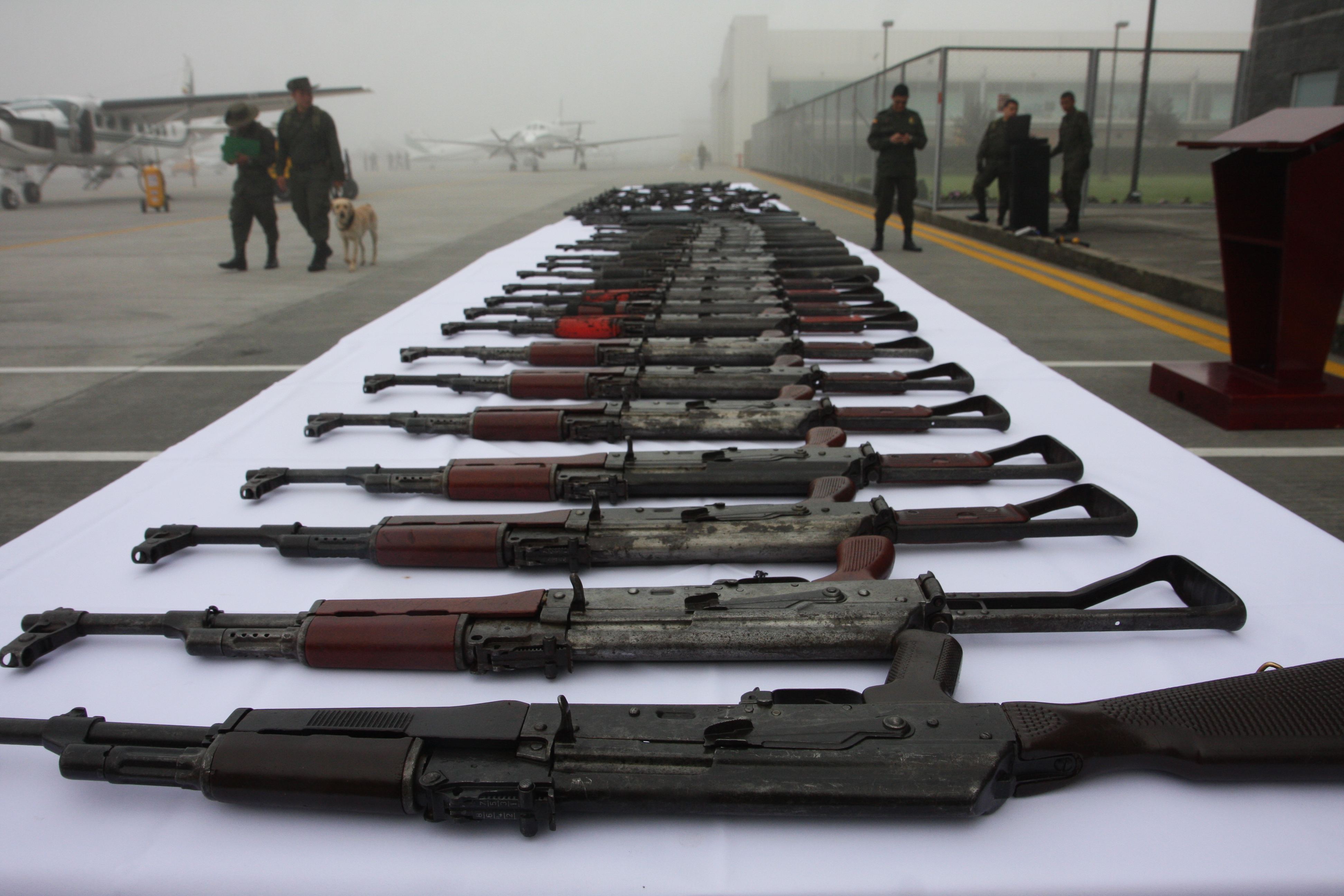 154 armas de fuego de esa banda criminal fueron incautadas por la DIJIN y la Dirección Antinárcoticos. Simultáneamente fueron ocupados varios predios de alias "Scuby", primo de "Macaco" y socio de la bacrim en el Eje Cafetero. Las propiedades están evaluadas en más de tres mil millones de peso